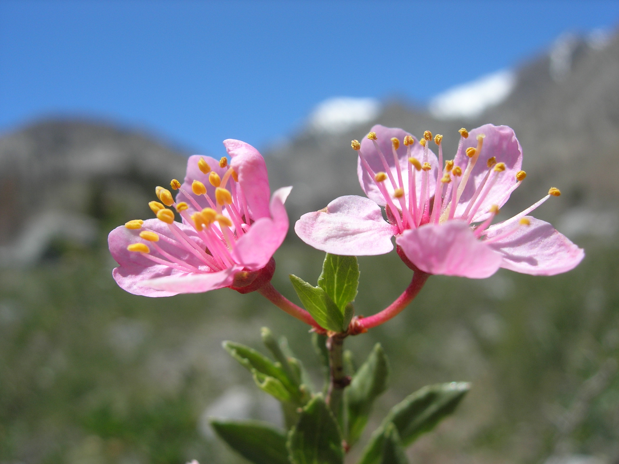 Prunus andersonii (Anderson's desert peach)